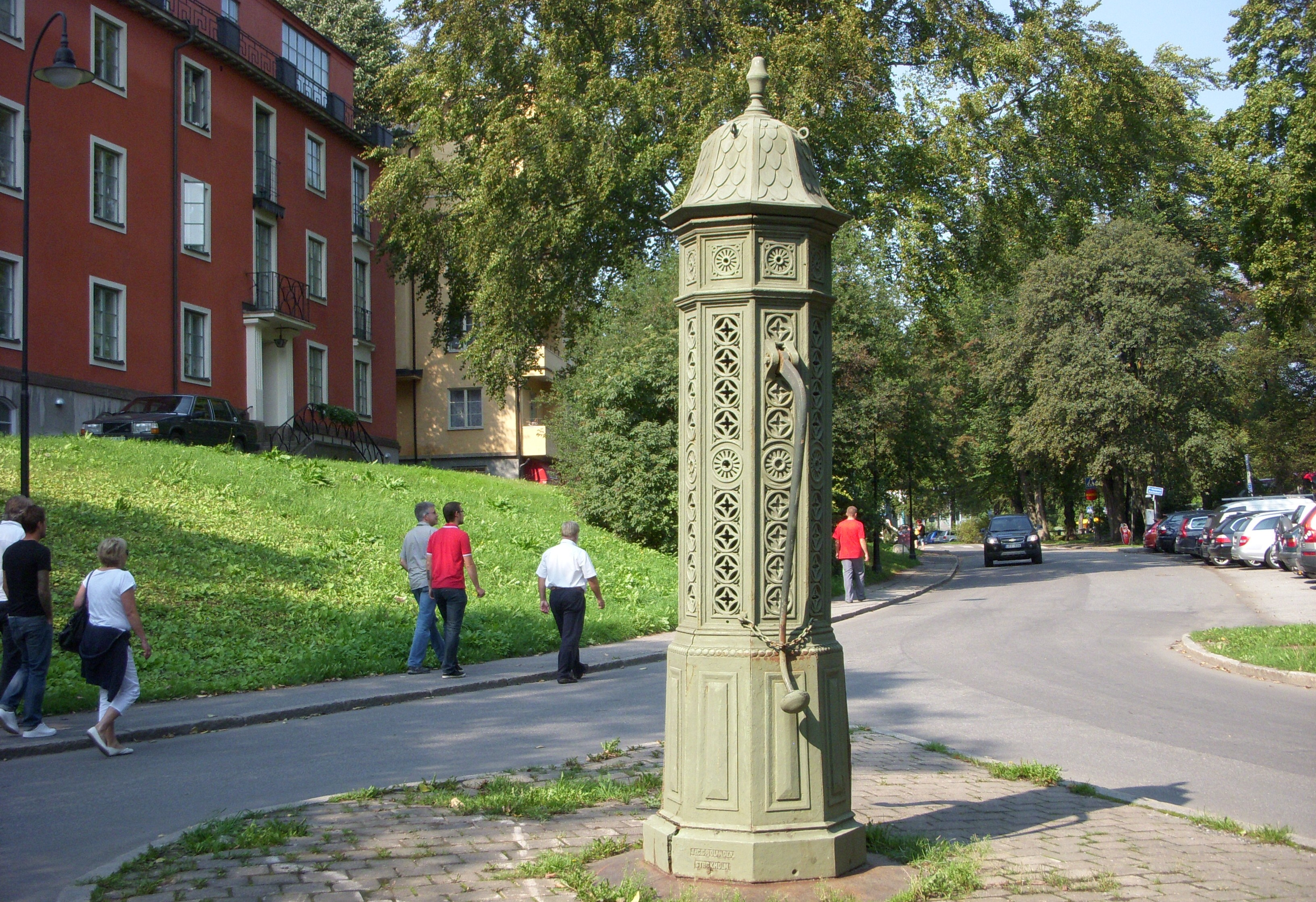 Djurgårdspumpen på Djurgårdsslätten